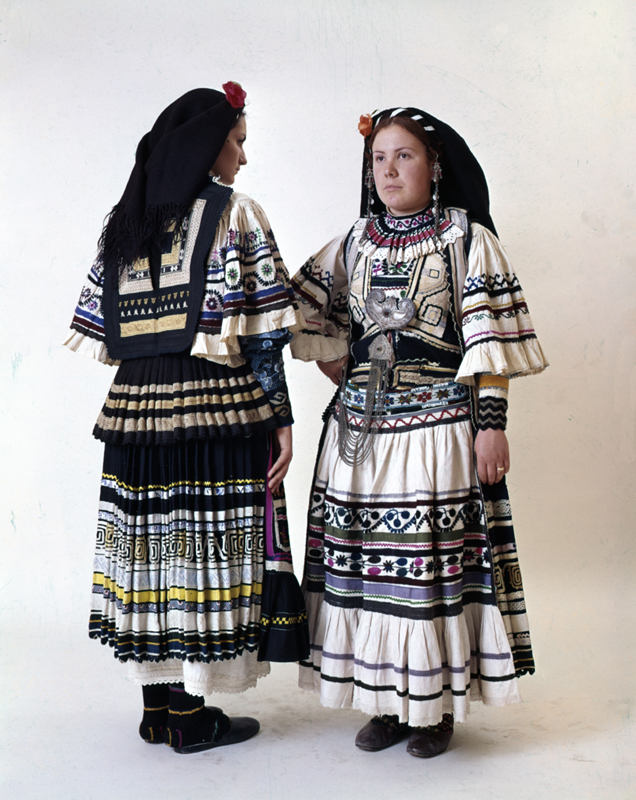 Γυναικείες σαρακατσάνικες φορεσιές, παραλλαγές της φορεσιάς "Σερβιάνα". Συλλογή Πελοποννησιακού Λαογραφικού Ιδρύματος, Ναύπλιο